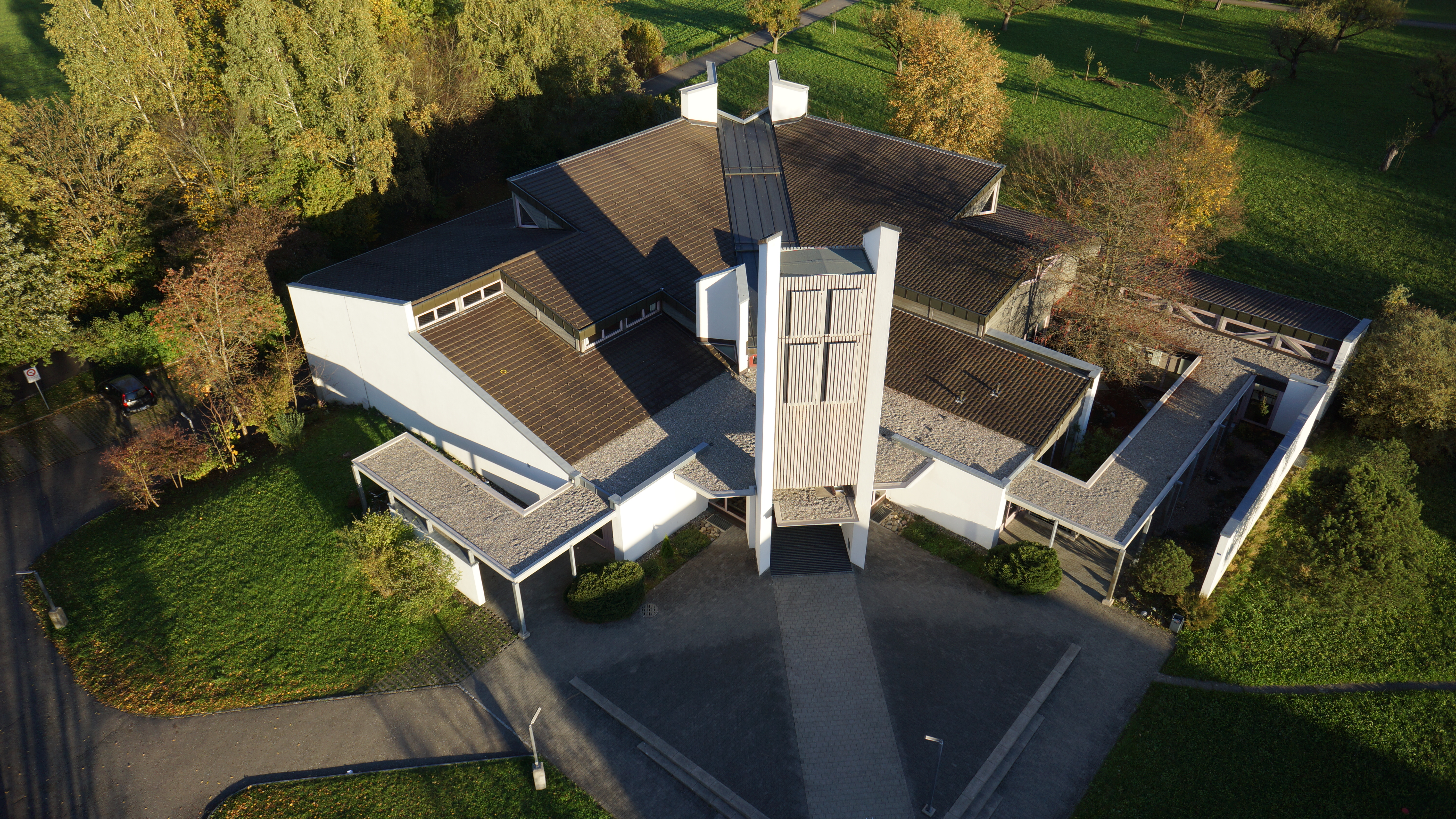 Römisch-katholische Kirche St. Katharina von Siena Fällanden, Ansicht von oben